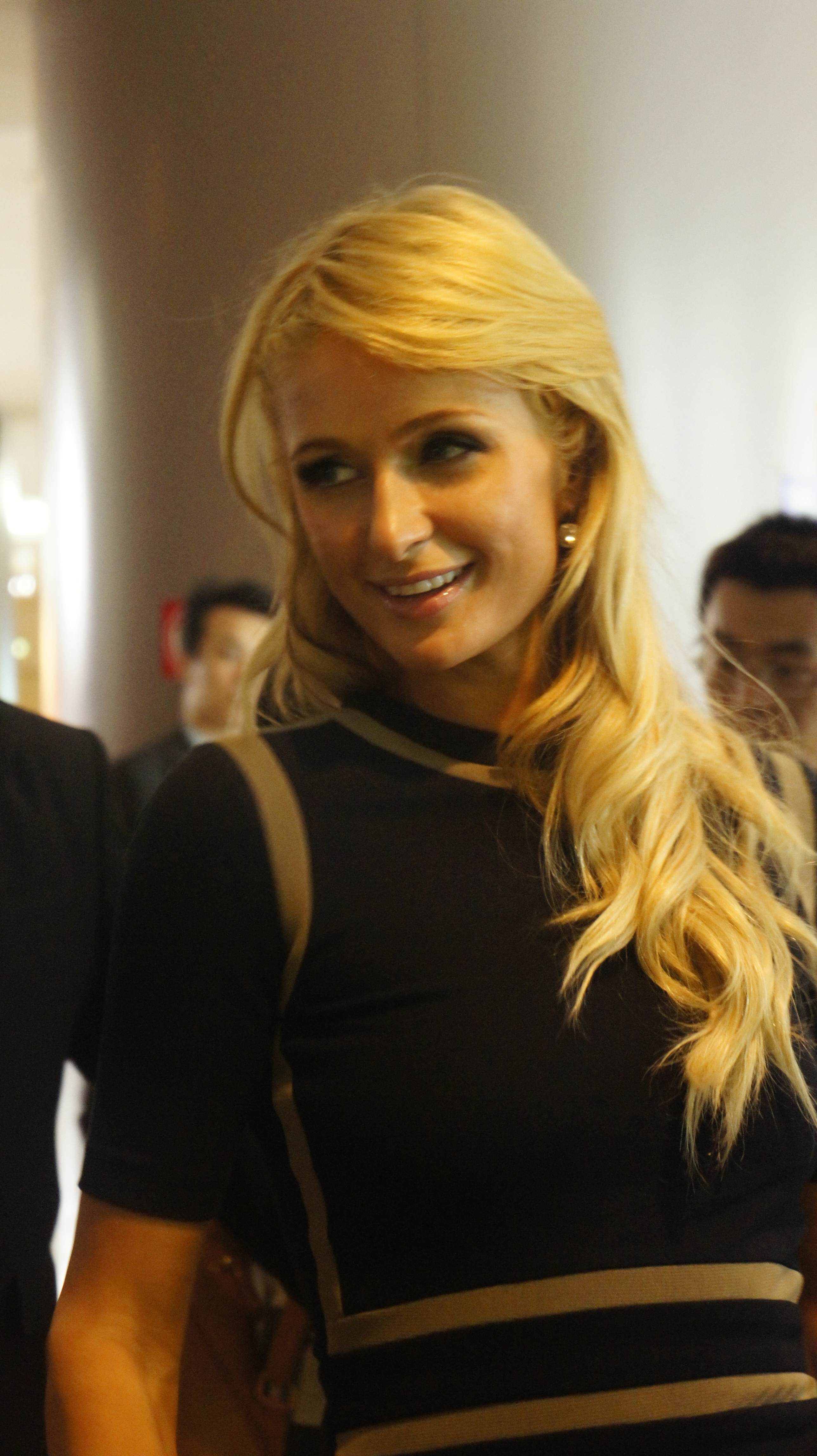 帕里斯·希尔顿在上海浦东新区陆家嘴正大广场参加活动，正配合拍照